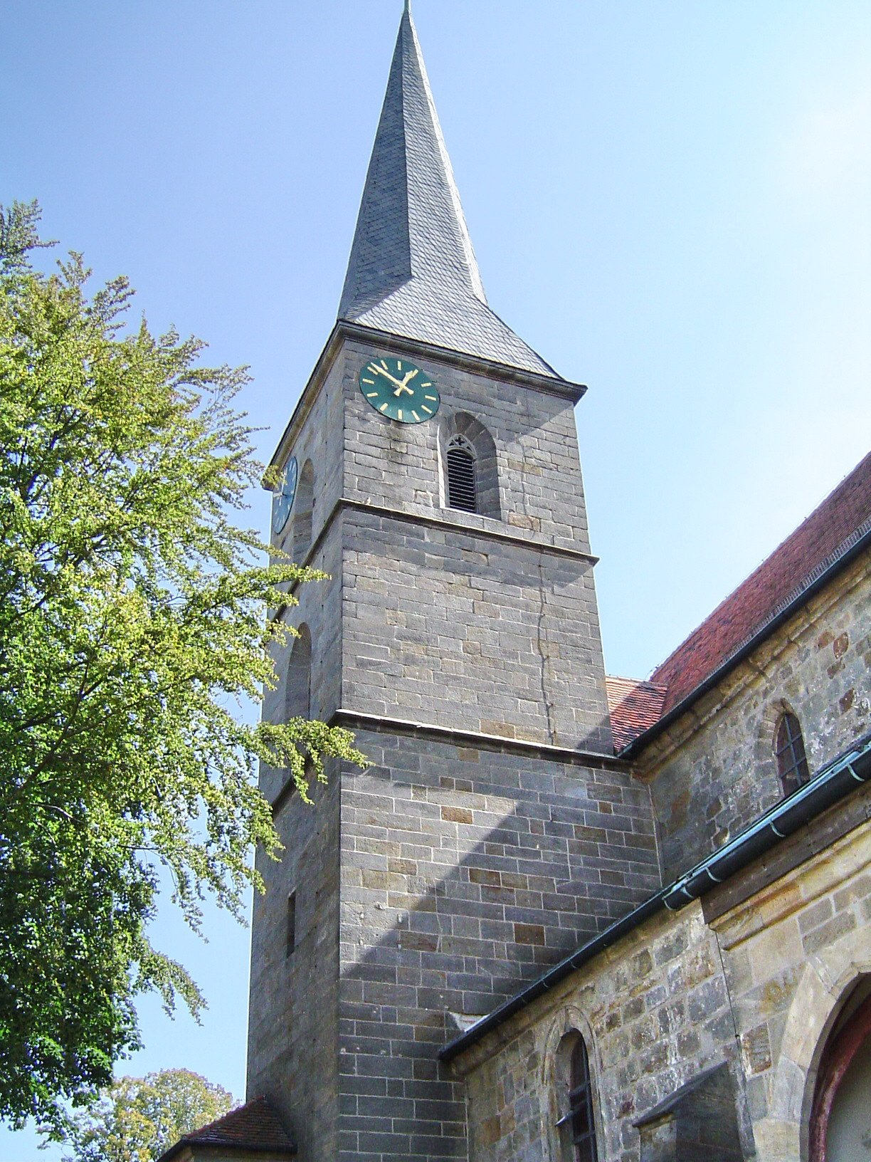 Gesees - Kirche „St. Marien zum Gesees“